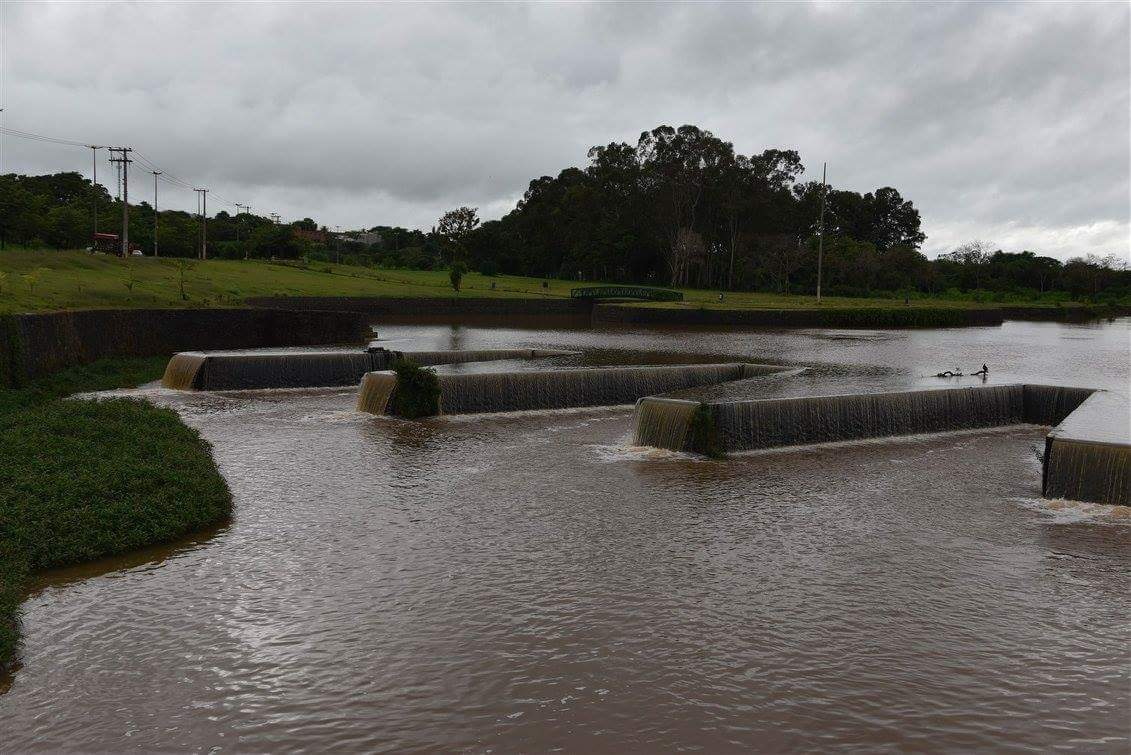 Represa Municipal de Catanduva